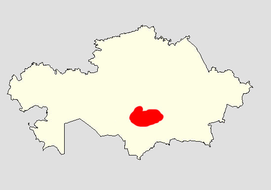 Мапа пустиње Бетпак-Дала